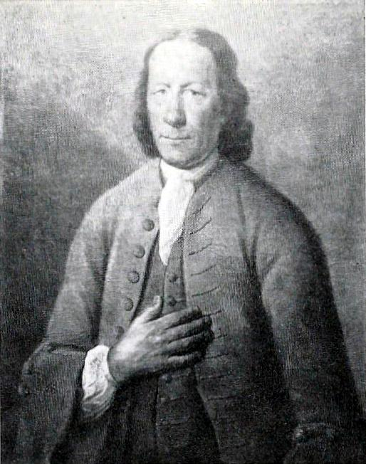 Porträt Hans Georg Benda (1686-1757), böhmischer Leineweber und Musiker, Stammvater der Musikerfamilie Benda (Familien).